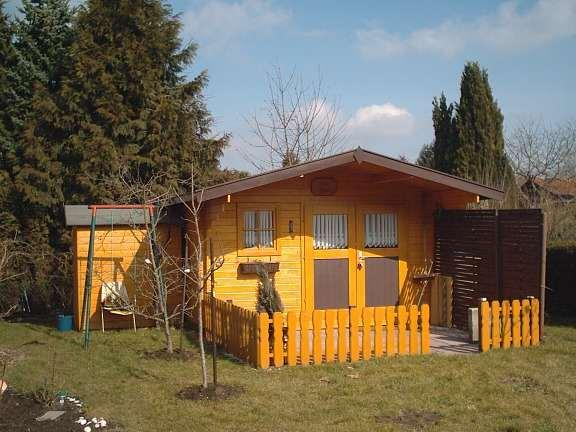 Gartenlaube – Holzbauweise